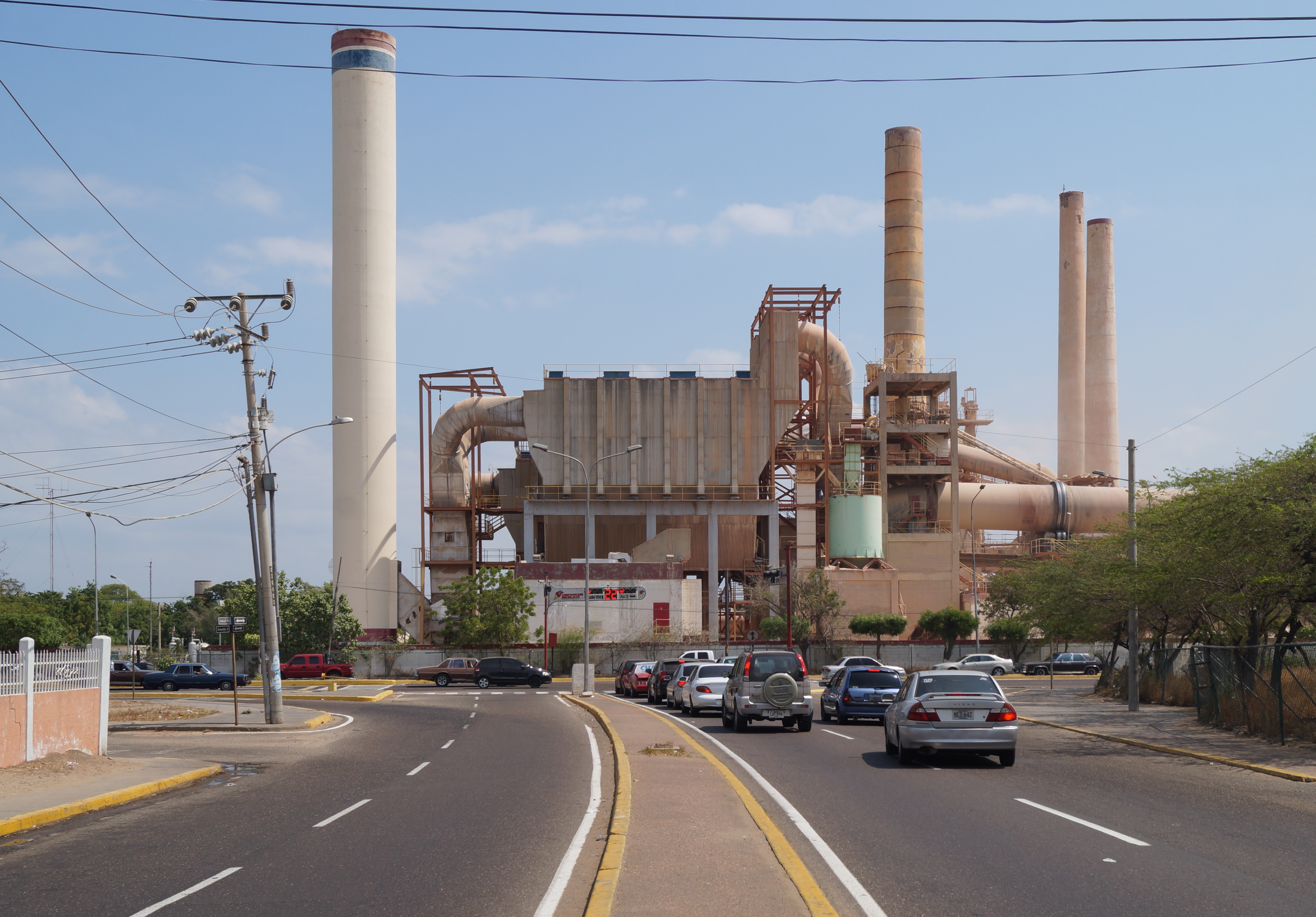 Fabrica de cementos. Maracaibo. Venezuela.